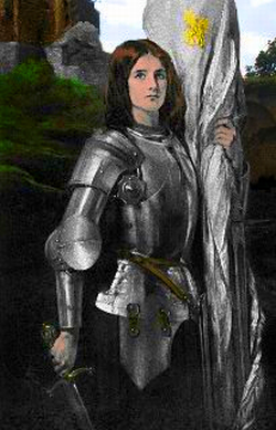 Jeanne d’Arc portréja